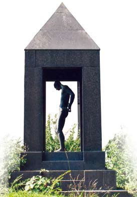 Die Bronzefigur des Heiligen Sebastian